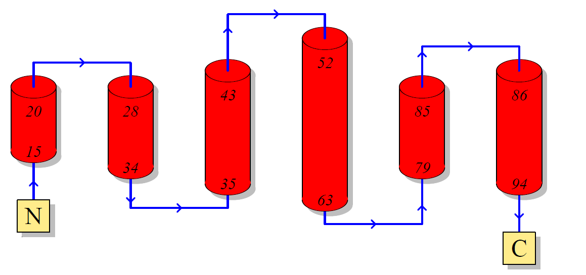 topologia mm-ck